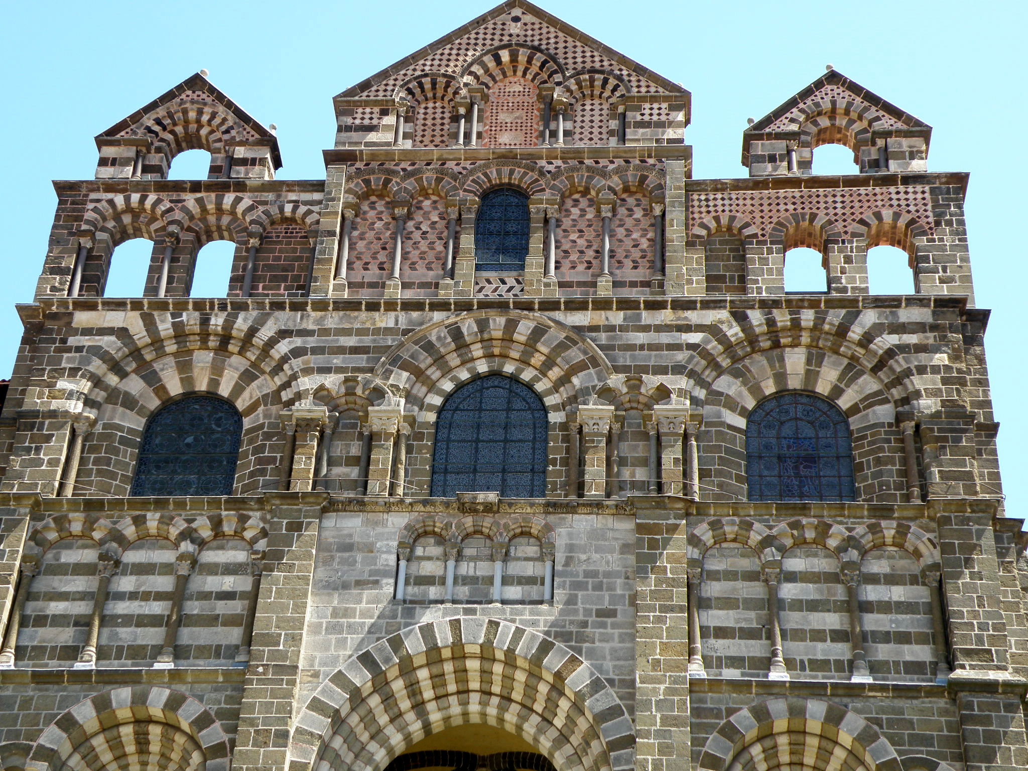 Le Puy-en-Velay (préf. de la Haute-Loire, France). Cathédrale Notre-Dame, façade occidentale.